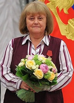 Светлана Евгеньевна Савицкая